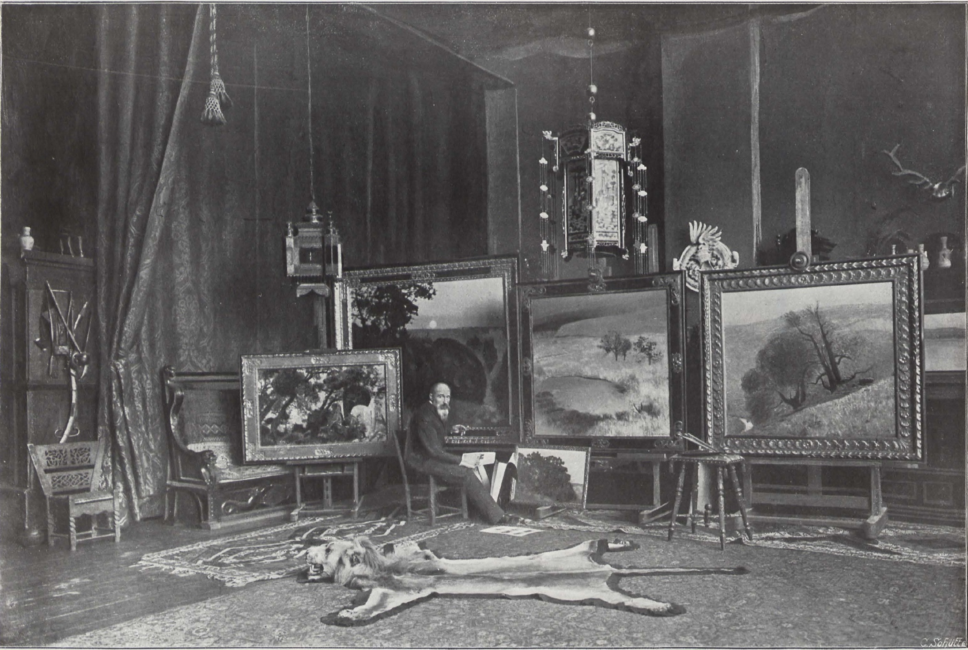 Eugen Bracht (1842-1921), deutscher Maler.